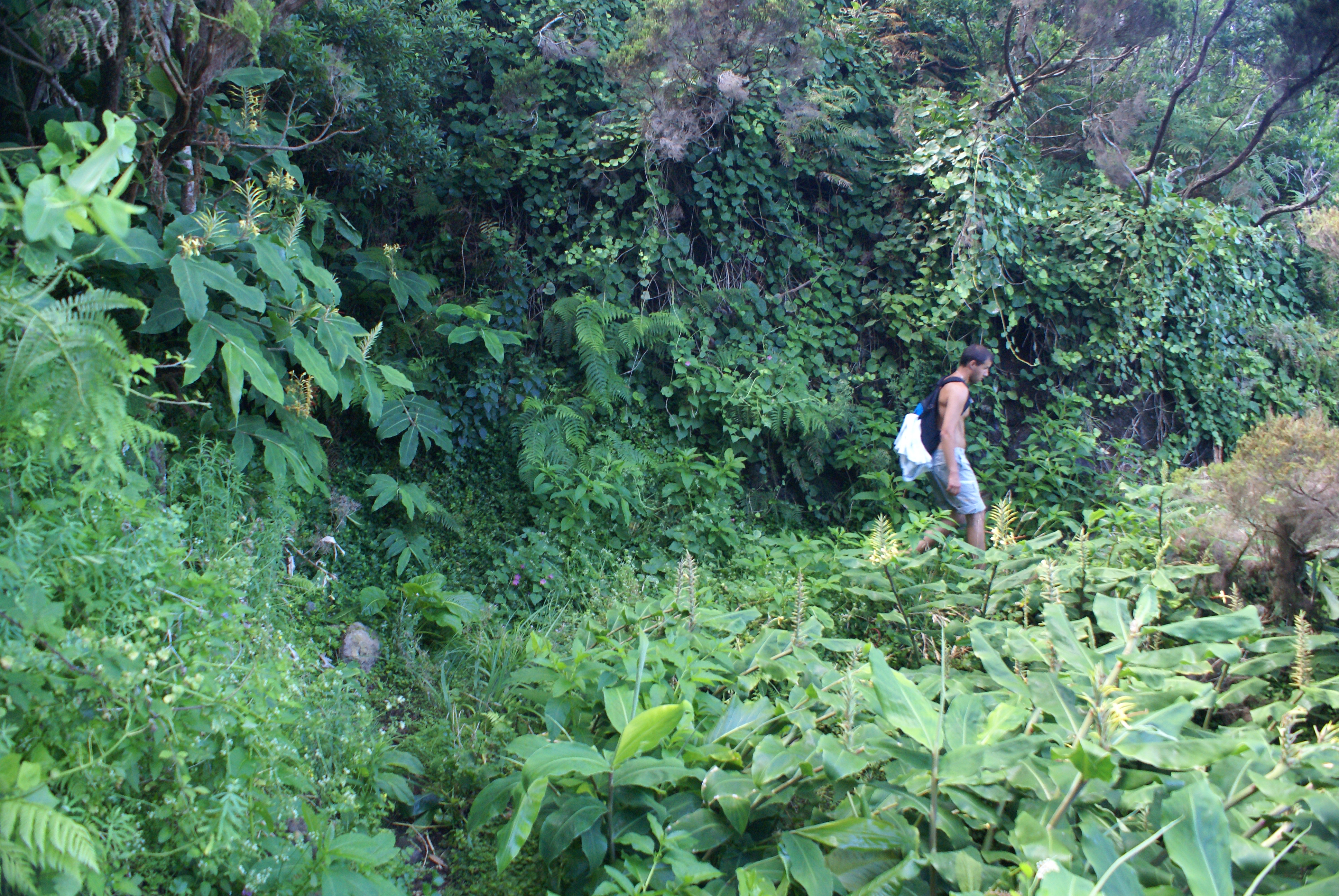 Fajã de Vasco Martins, veredas por entre a floresta de endémicas da Laurissilva típicas da flor da Macaronésia, Velas, ilhas de São Jorge, Açores